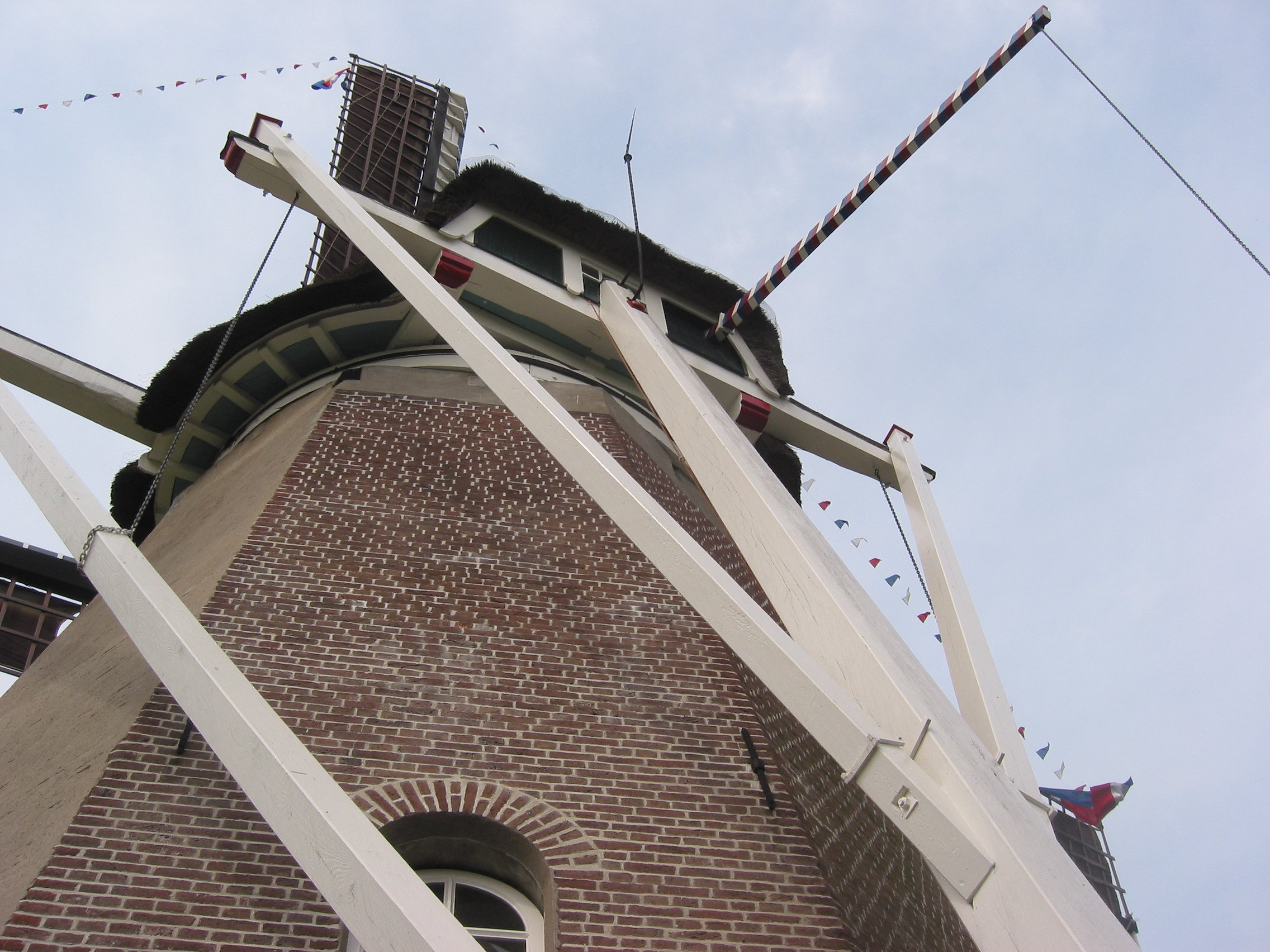 Vang van De Keetmolen Ede, Nederland